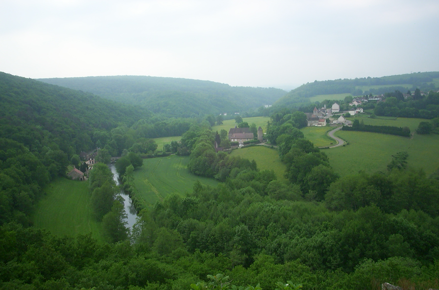 Landscape, Morvan, France